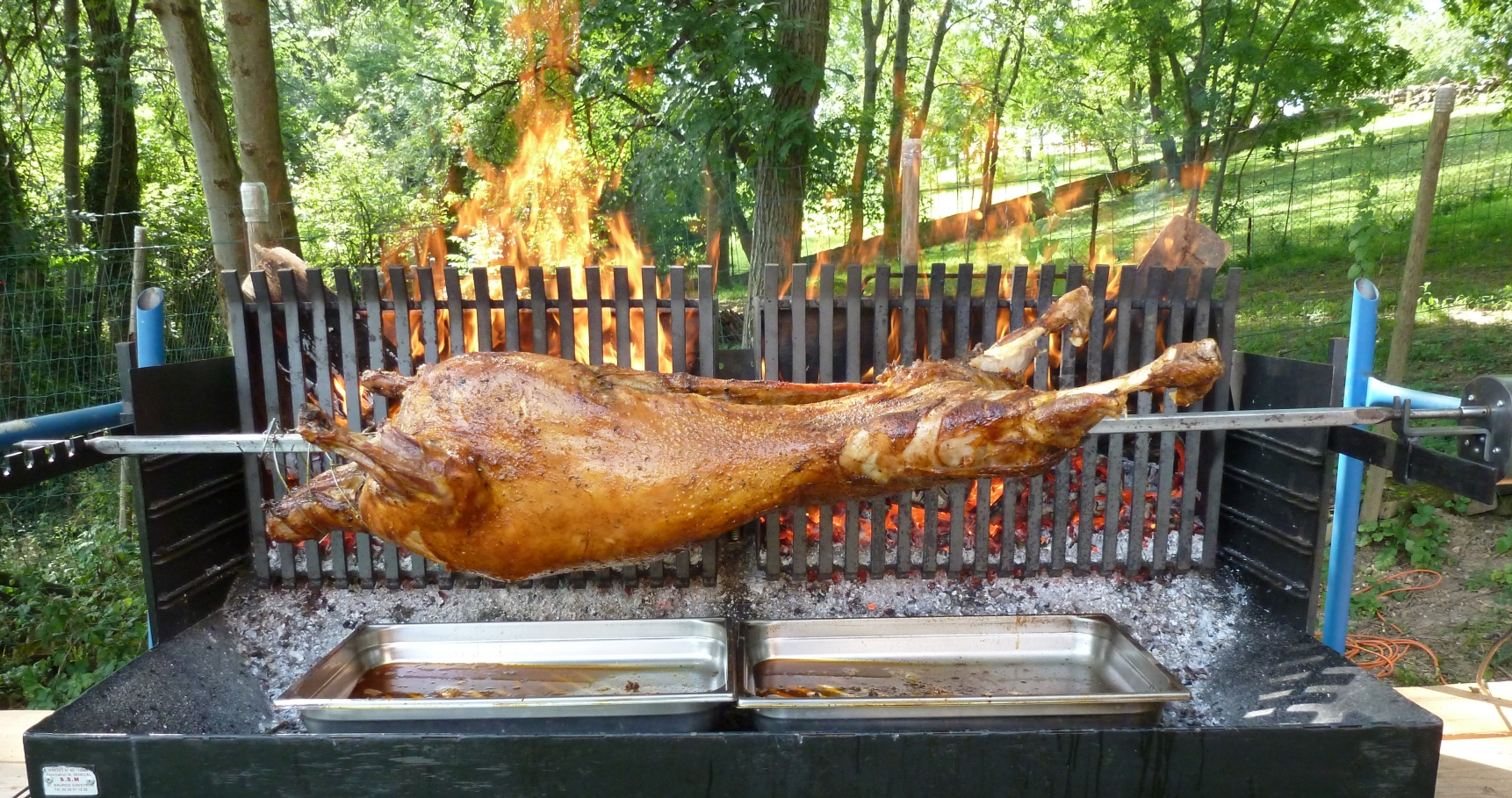 Mechoui vor vertikalem Glutkasten, nach etwa 2h Garzeit